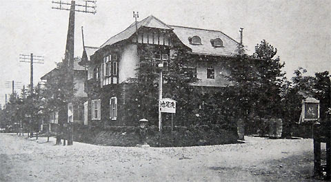 田園都市株式会社洗足本社社屋